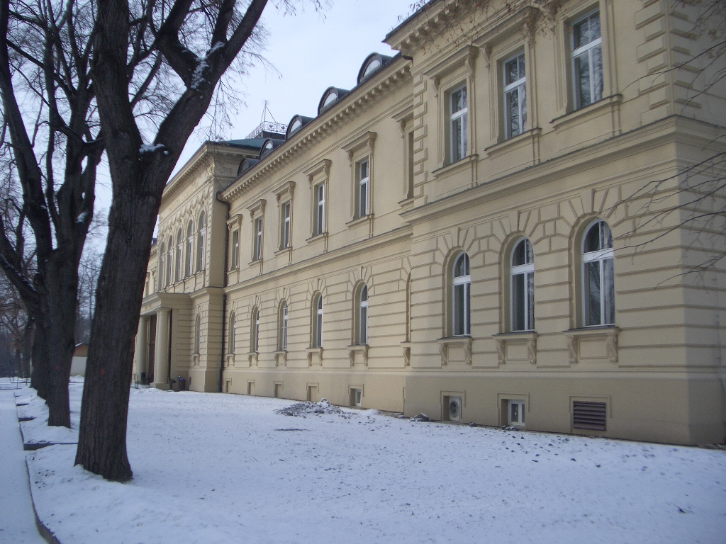 Domov pro zrakově postižené Palata, Praha